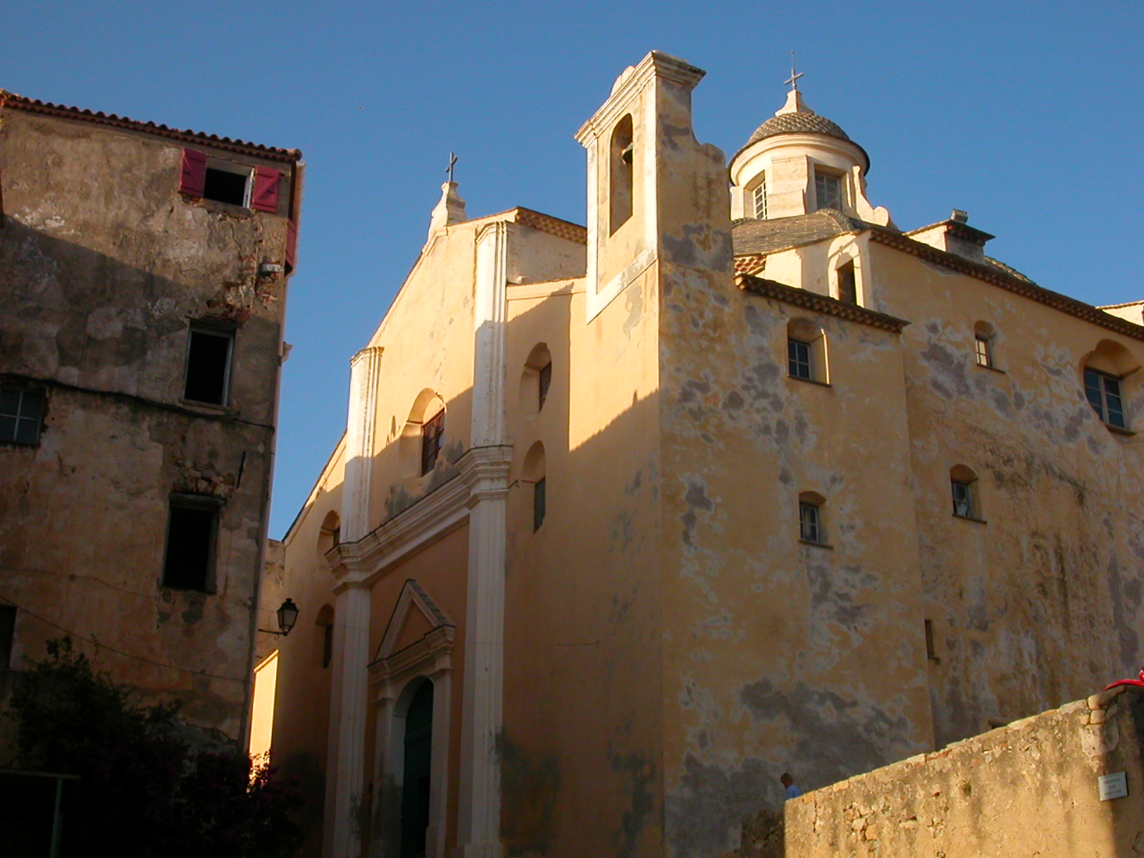 Pro-cathédrale Saint-Jean-Baptiste, Calvi, CorseBrezhoneg: An iliz veur, Calvi, Corsica .